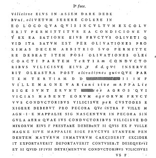 Inscription d'Henchir-Mettich face 3